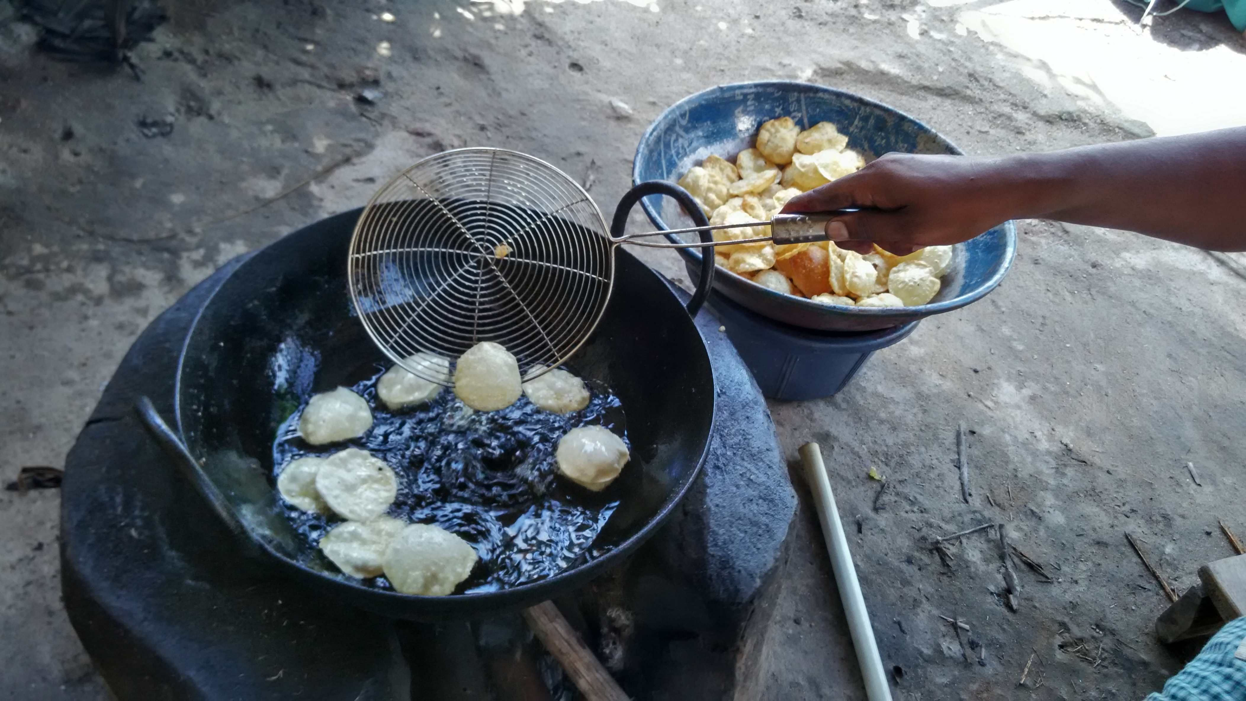 பானி பூரி உருவாக்க நிலை: எண்ணெயில் பொரித்தல்.